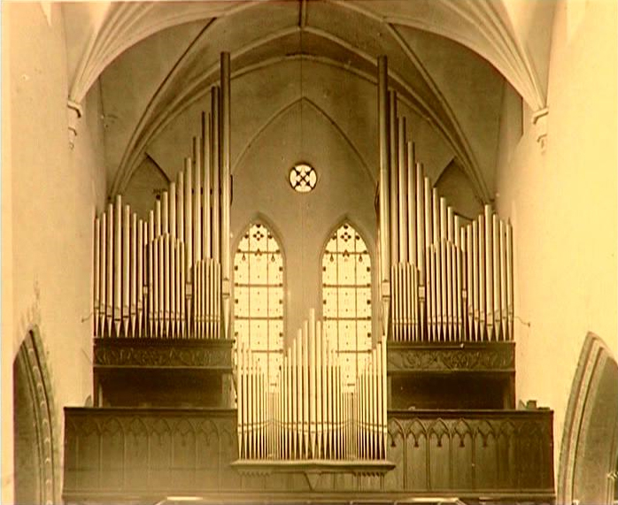 Die Orgel von St. Martin zu Memmingen von 1938.